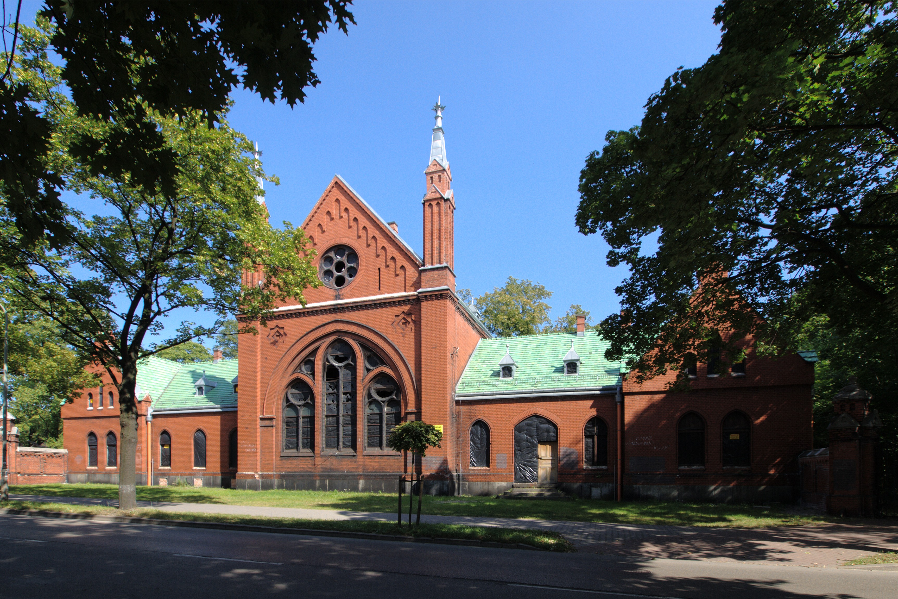 Ulica Poniatowskiego w Gliwicach. Dom przedpogrzebowy cmentarza żydowskiego (zabytek nr rejestr. A/87/03).